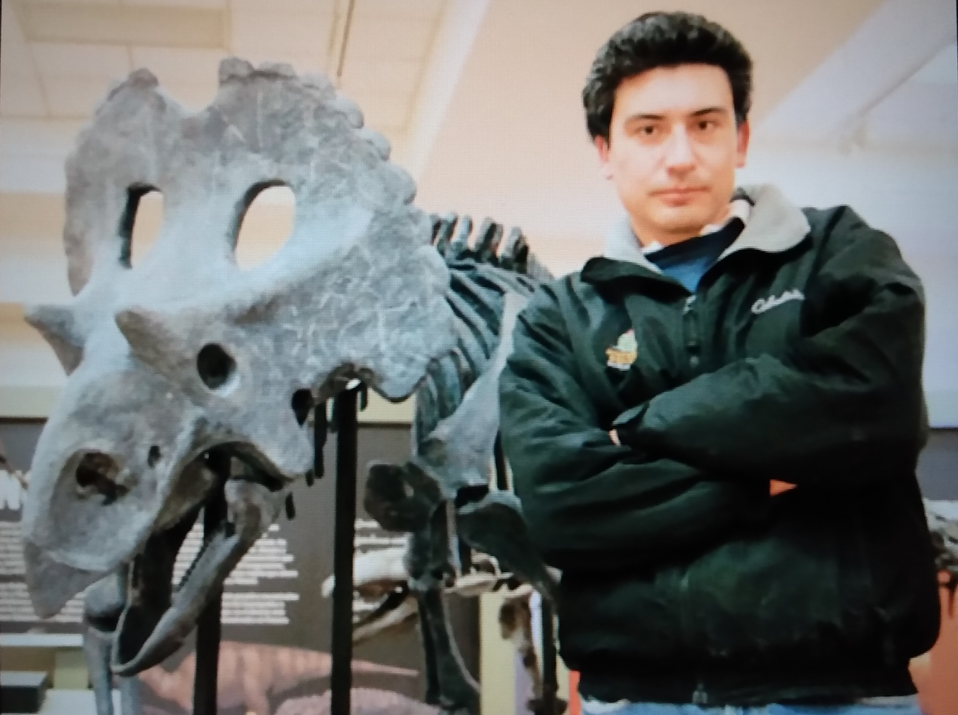 Héctor E. Rivera Sylva